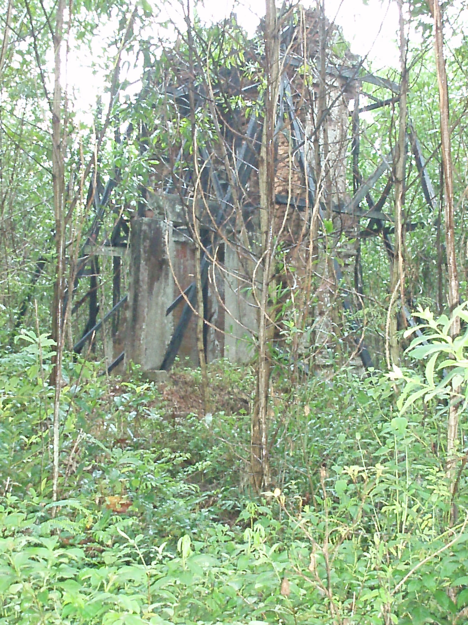 Tôi sáng tạo ra toàn bộ tác phẩm